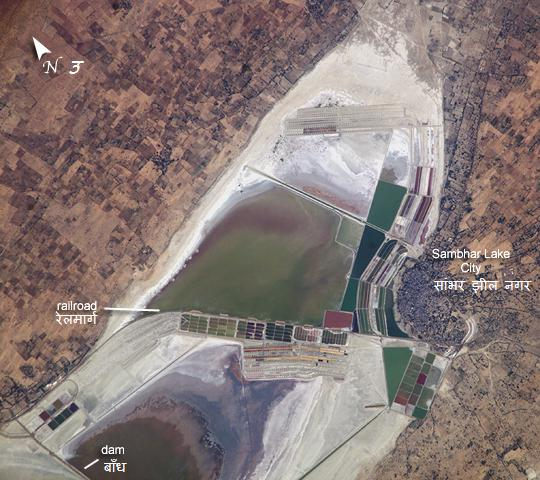 सांभर झील